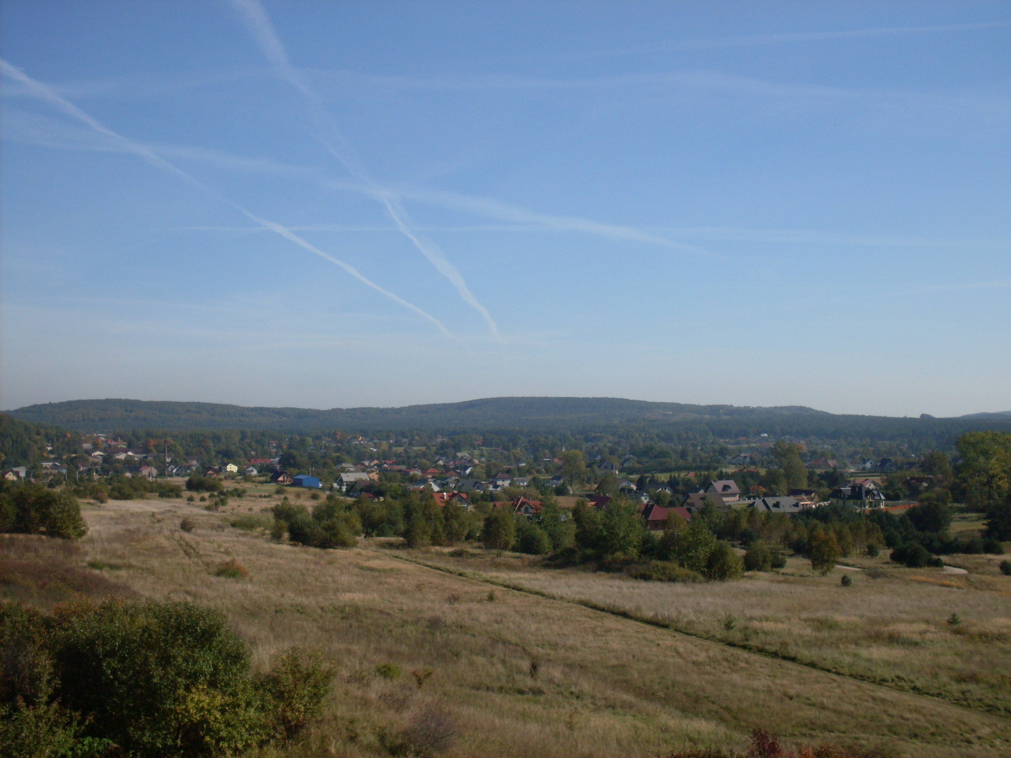 Tenczynek - widok ze wzgórza Skałka